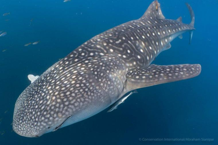 Hiu Paus Sumber